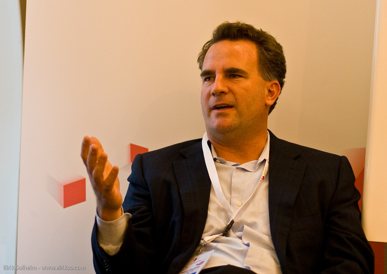 Reggie Bradford